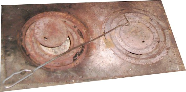 Stara płyta kuchenna z leżącym haczykiem